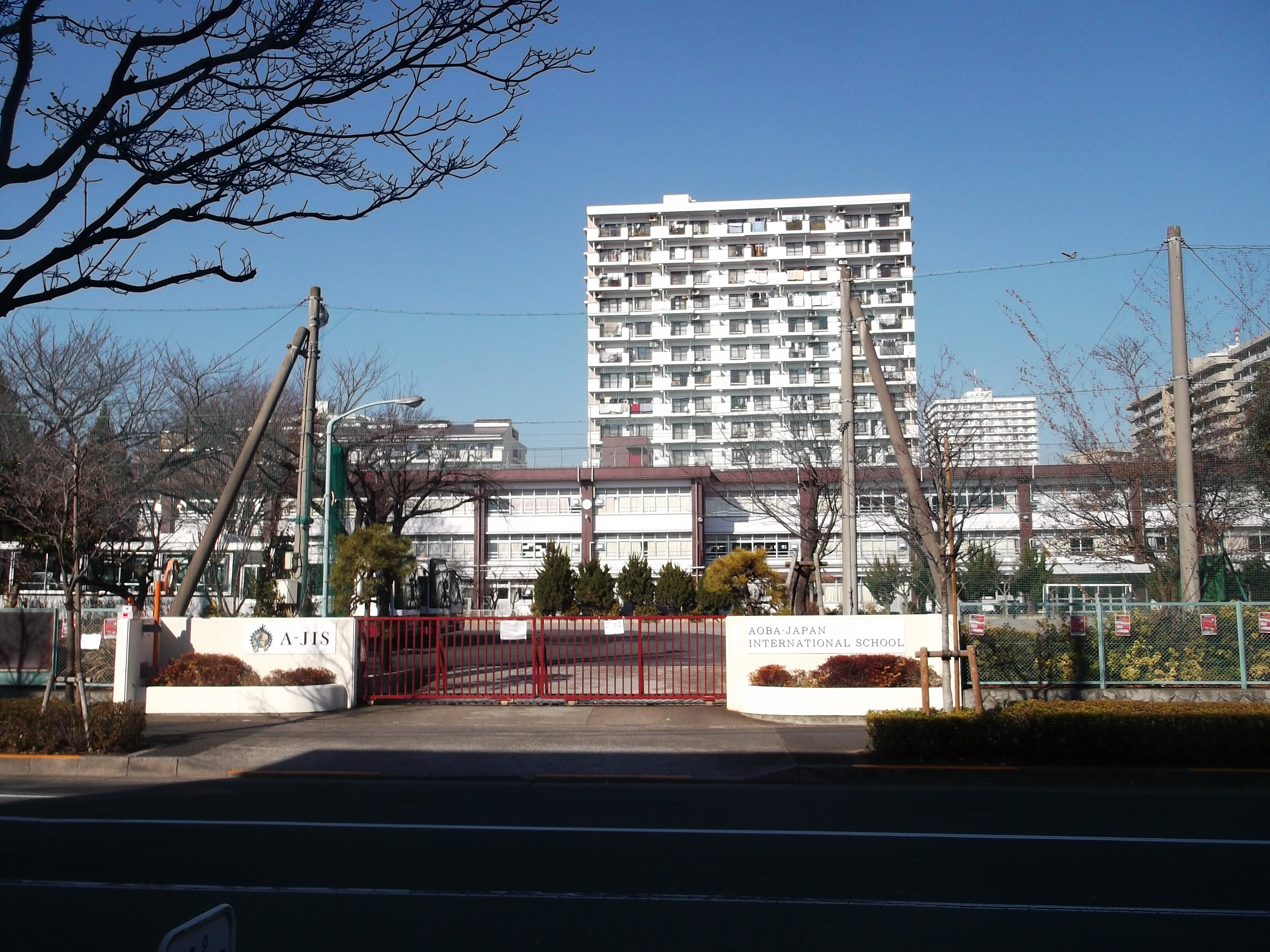 アオバジャパンインターナショナルスクール光が丘キャンパス